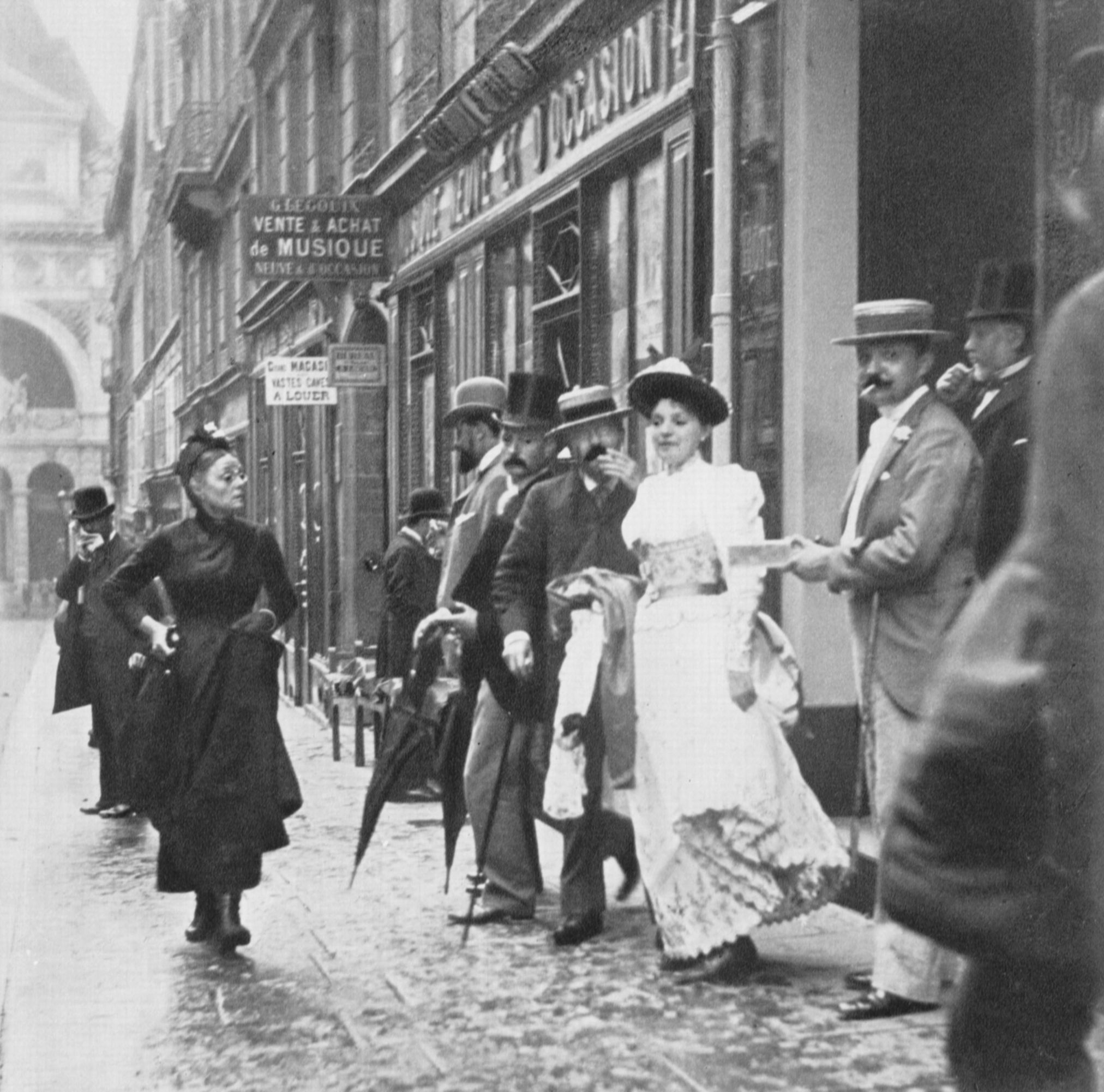 Primoli, Giuseppe: Bewunderer der Réjane